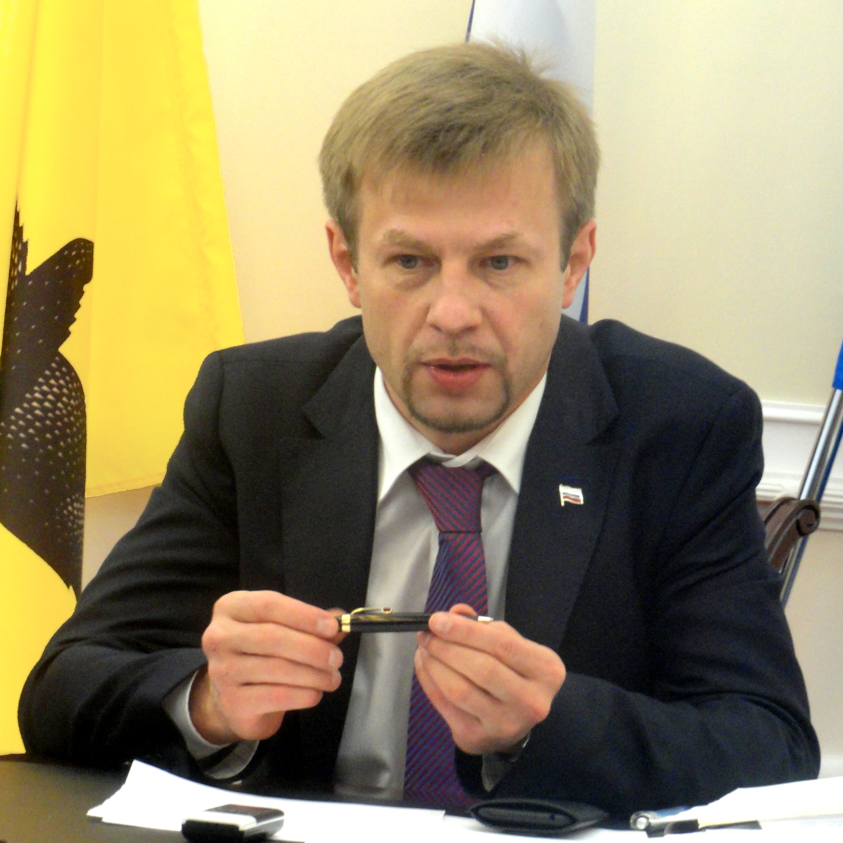 Мэр Ярославля Евгений Урлашов в своём рабочем кабинете 22 сентября 2012 года